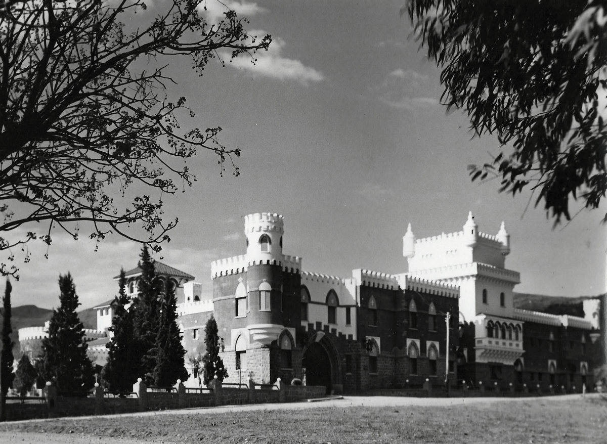 El Castillo Monte Olivo, o Castillo Hotel, en los años '30 o "40.